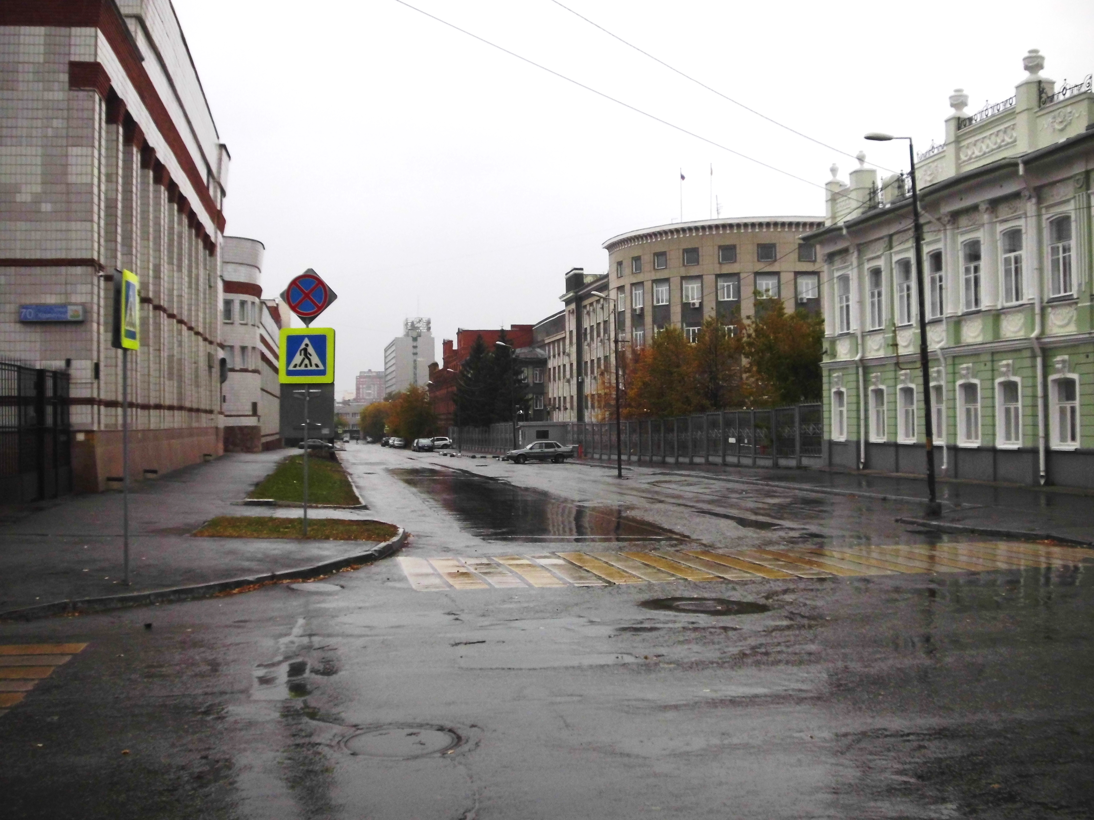 Улица Васенко города Челябинска. Вид с пересечения с улицей Коммуны в северном направлении. Справа - особняк Архипова: улица Васенко, 41 / улица Коммуны, 68. Далее, через здание справа - Чаеразвесочная фабрика Кузнецова (ул. Васенко, 37).